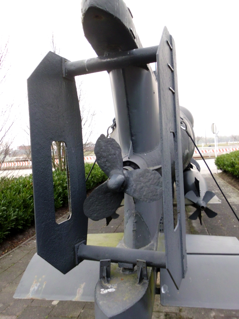 Blick auf Propeller und Ruder